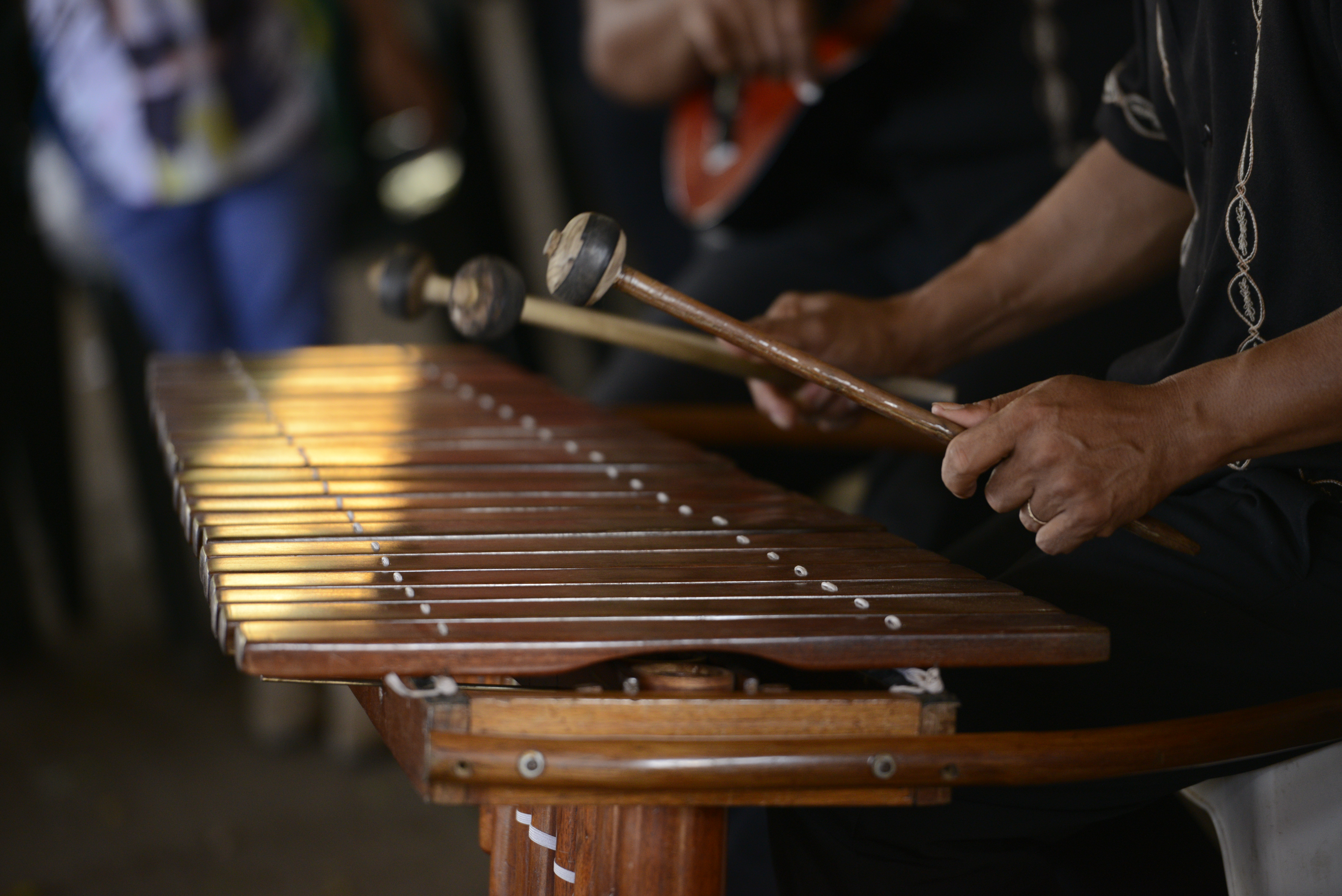 fotos de baile de negras, Masaya Nicaragua tomada por Maynor Valenzuela